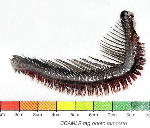 Aethotaxis mitopteryx, 1st gill arch, East Antarctica, 2010